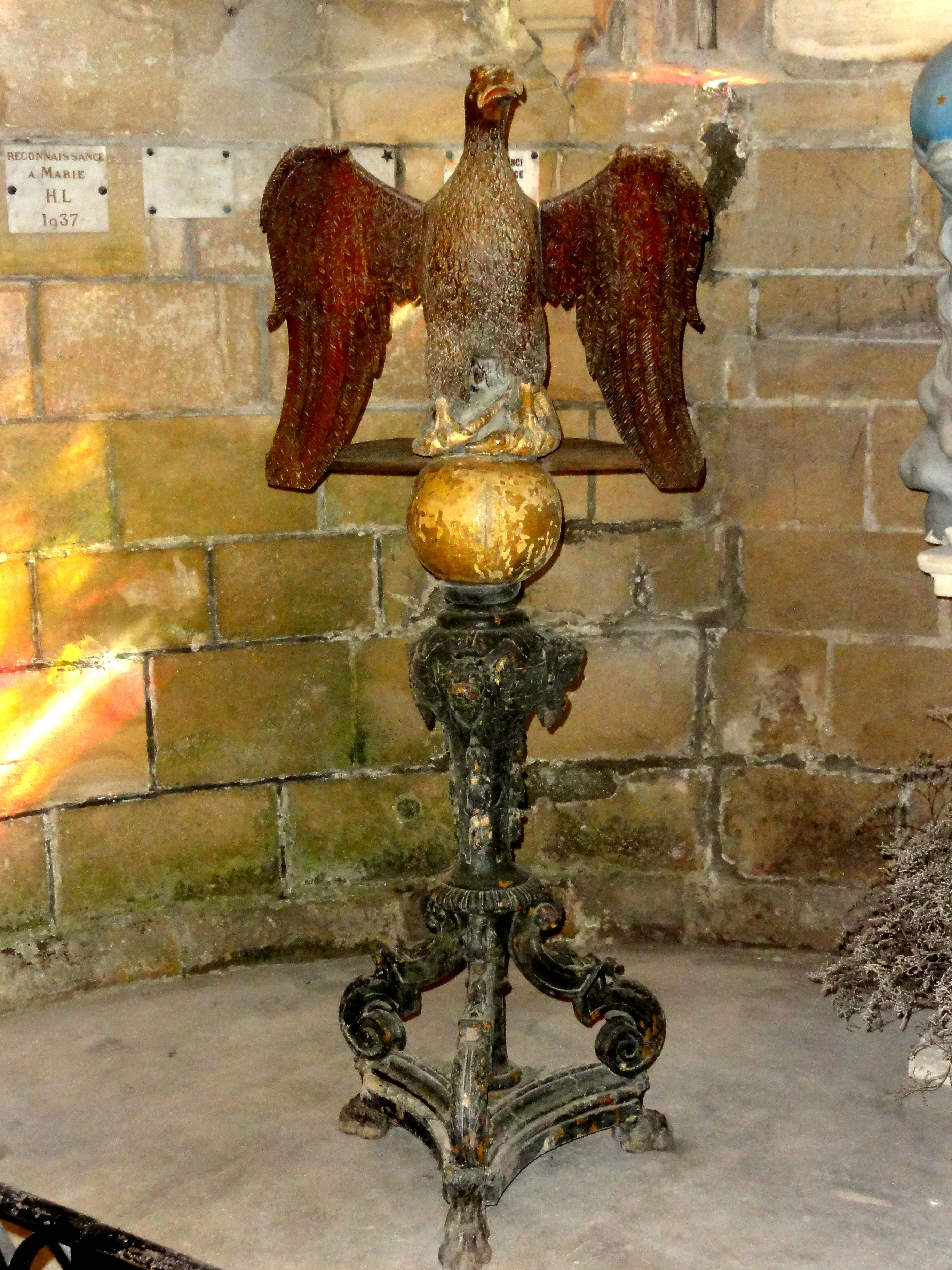 Aigle-lutrin.